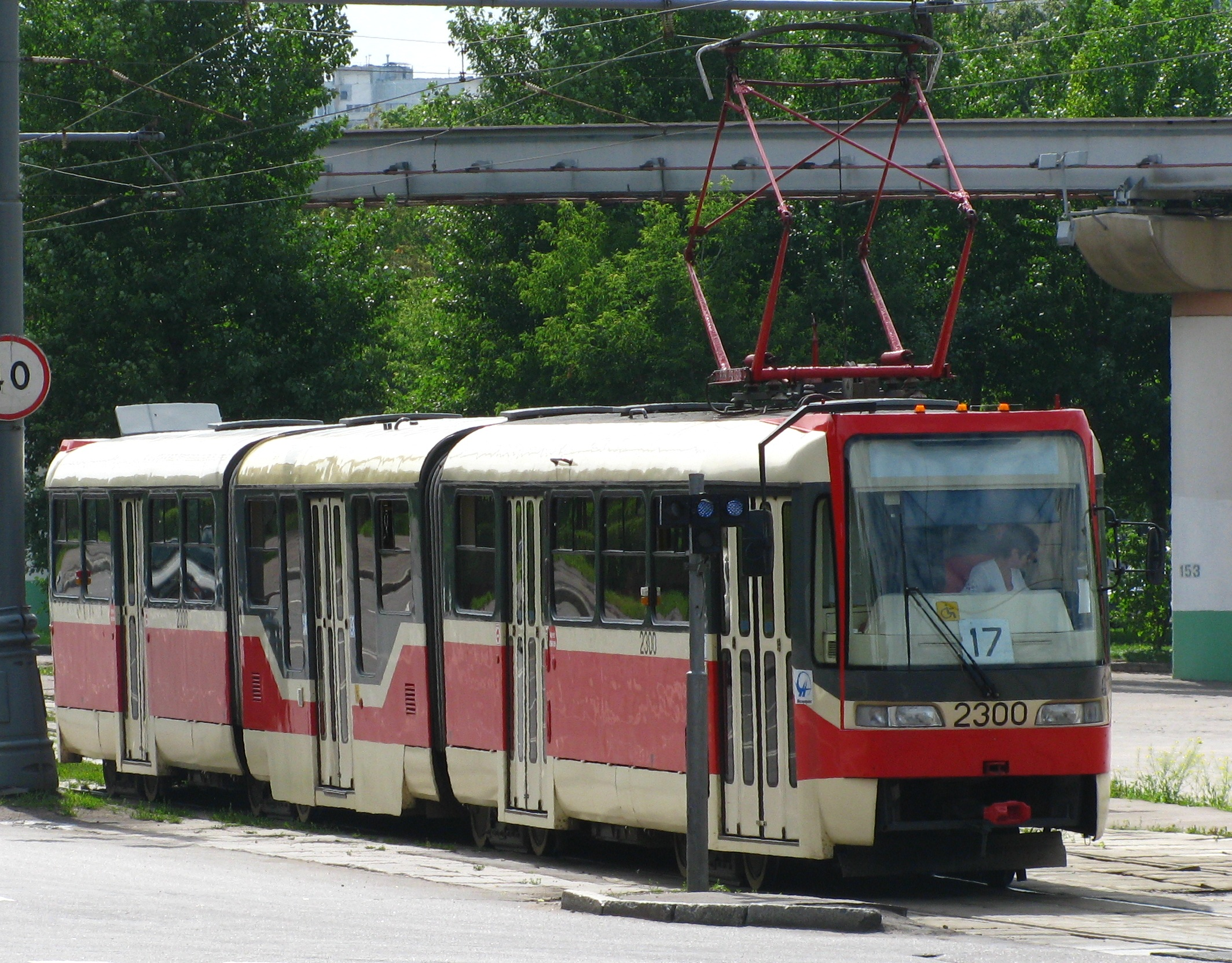 Tatra KT3R 17-го маршрута около остановки «ВДНХ. Северный вход».